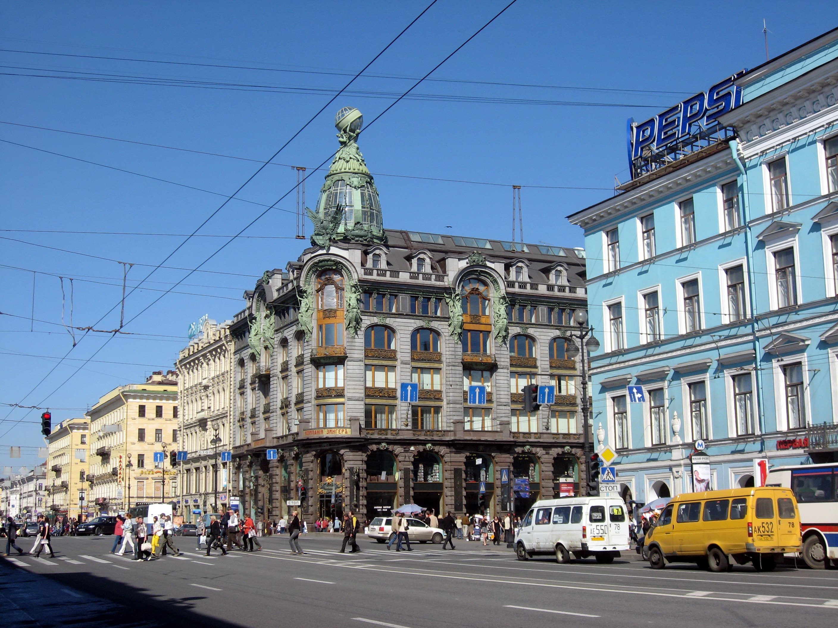 Sankt-Petěrburg (Petrohrad), Něvský prospekt